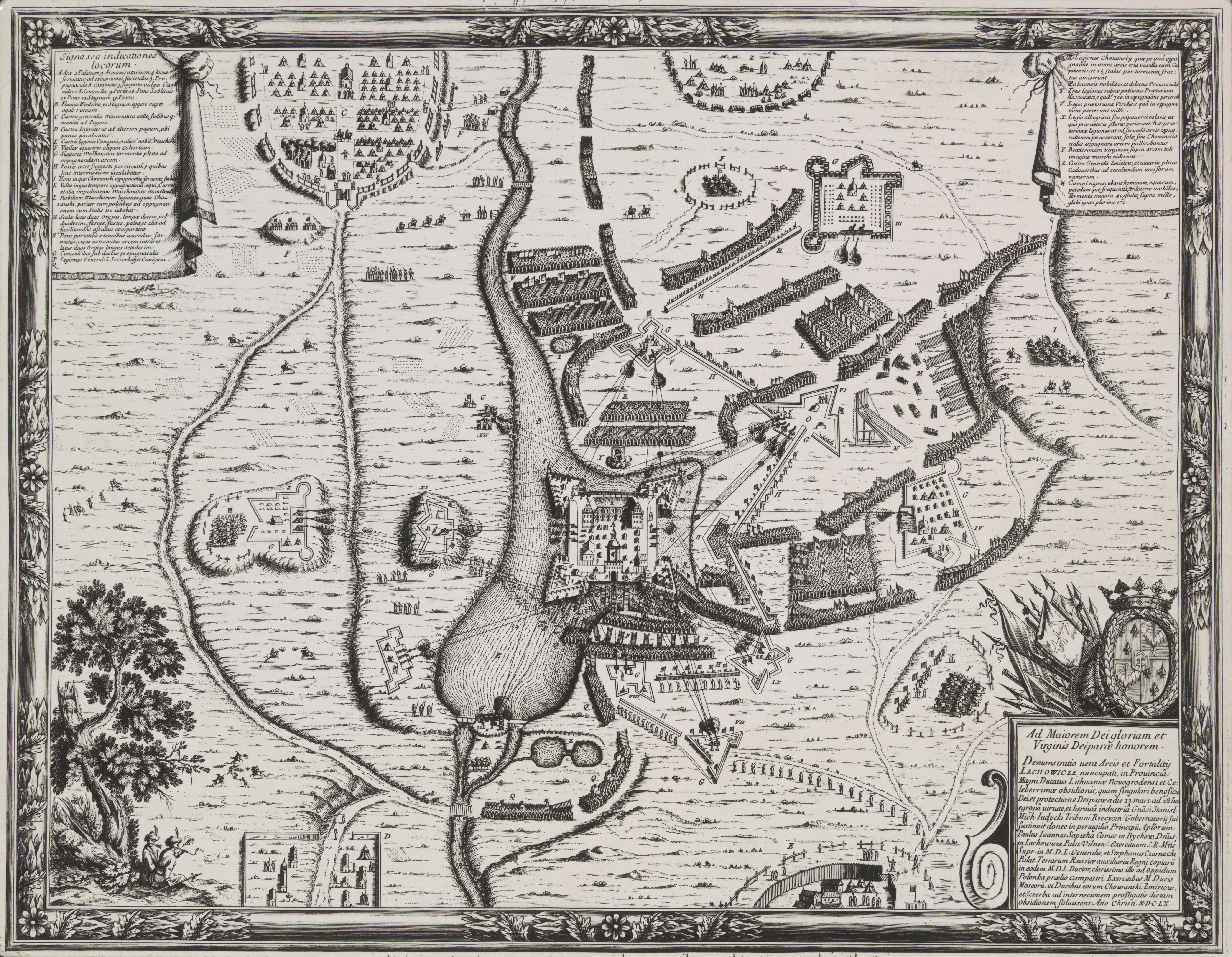 Беларуская (тарашкевіца): Ляхавічы (Lachavičy). Аблога места